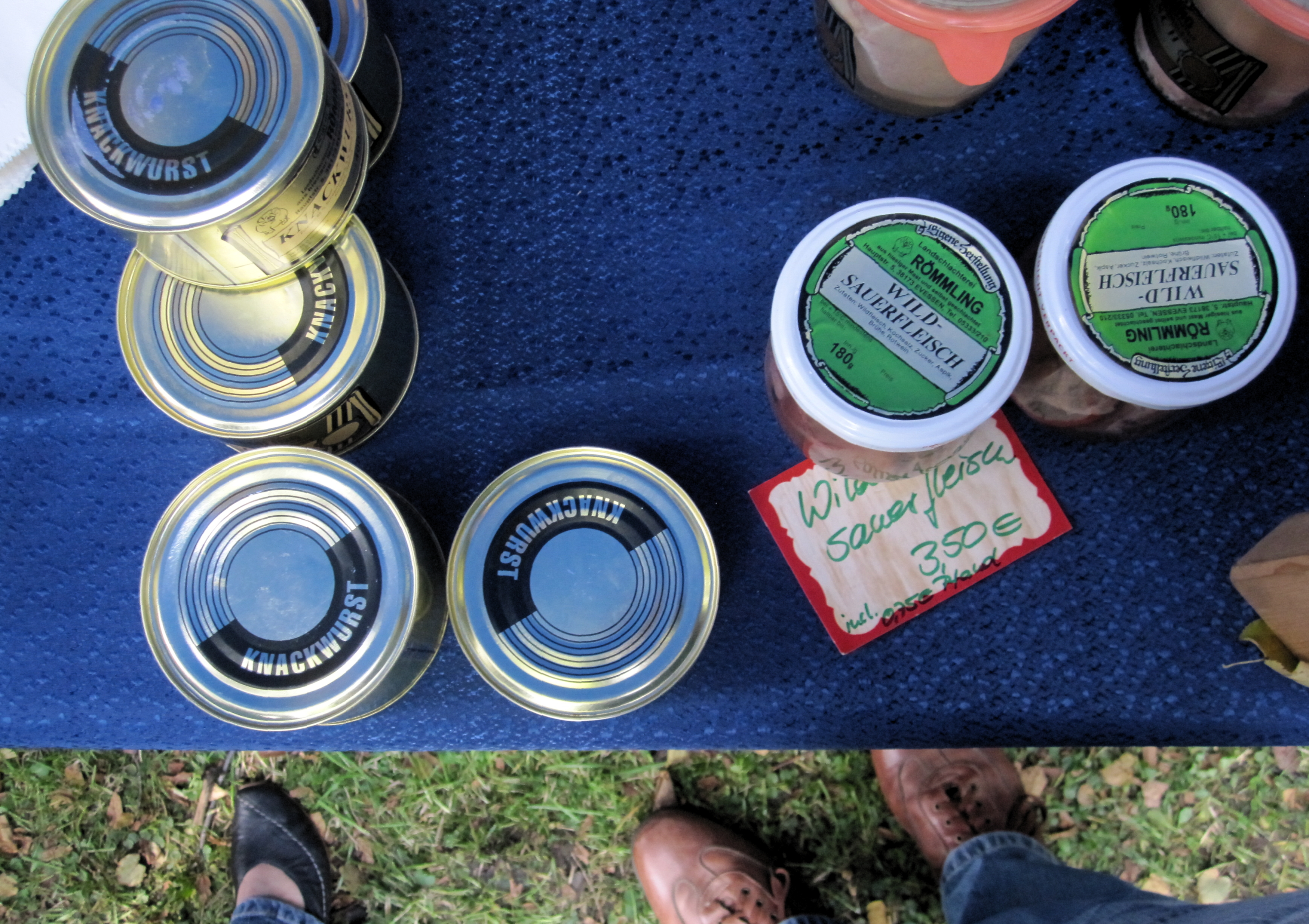 (Braunschweiger) Knackwurst in Dosen und Wild-Sauerfleisch in Gläsern, konservierte Wurst- und Fleischwaren auf dem anlässlich des Erntedankfestes 2010 im Klostergarten der Klosterkirche Riddagshausen abgehaltenen Markt